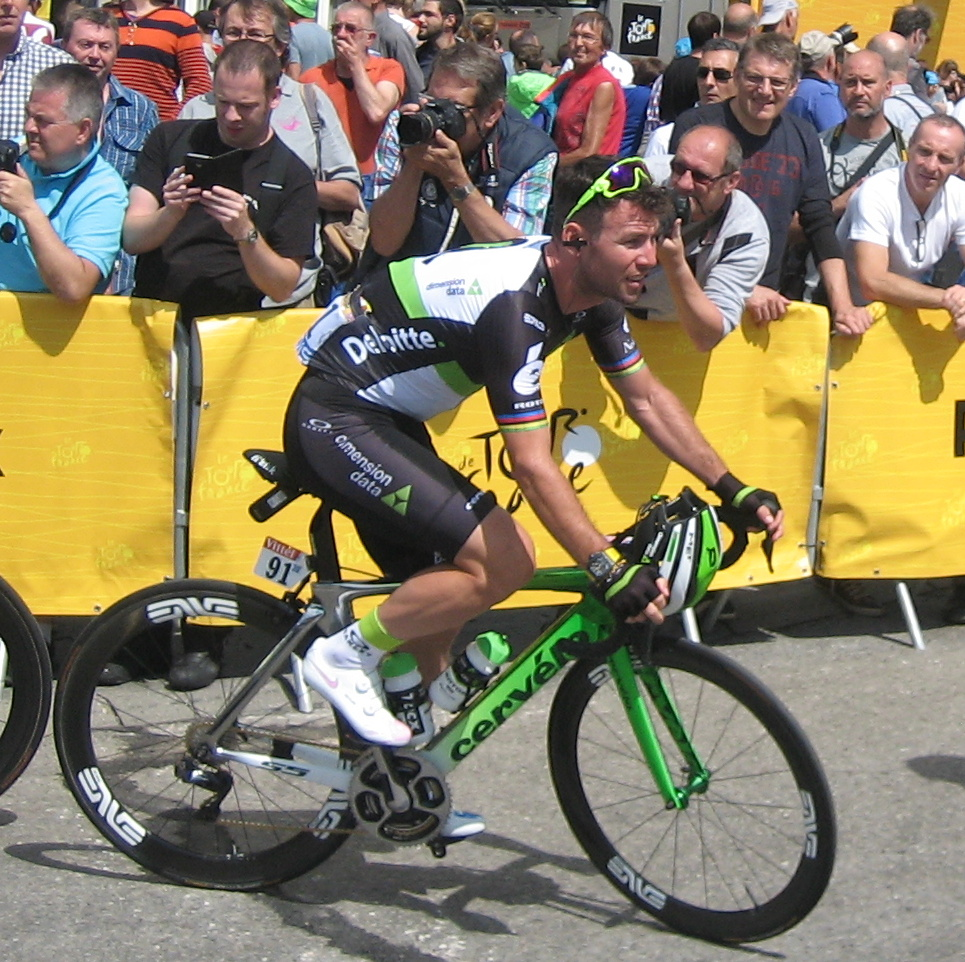 Start in Verviers (België) van de 3e etappe van Le Tour de France 2017.